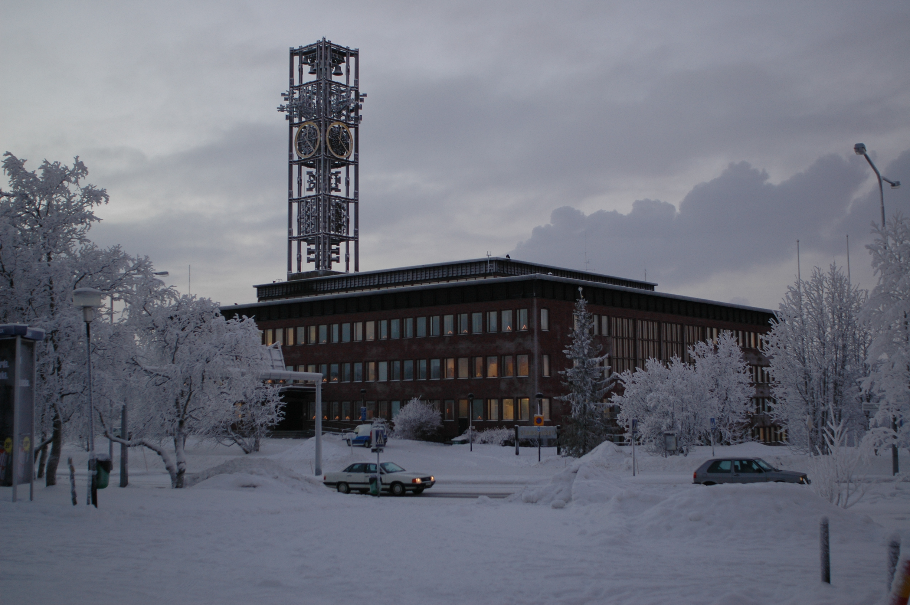 Kiruna cityhall